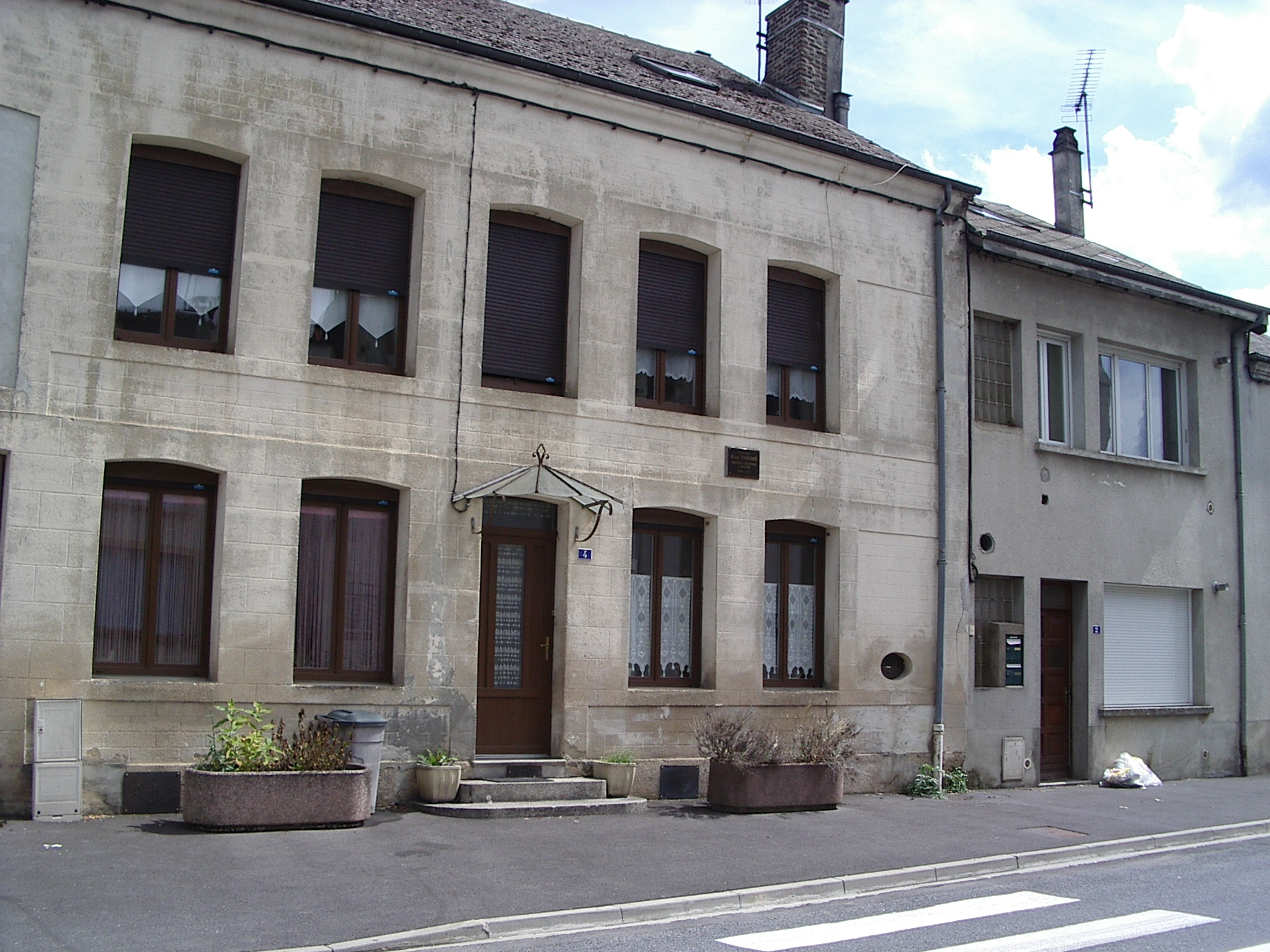 Thilay : Maison d' Eva Thomé (Thilay, 29 juin 1903 - Charleville-Mézières, 8 juin 1980), romancière et résistante ardennaise